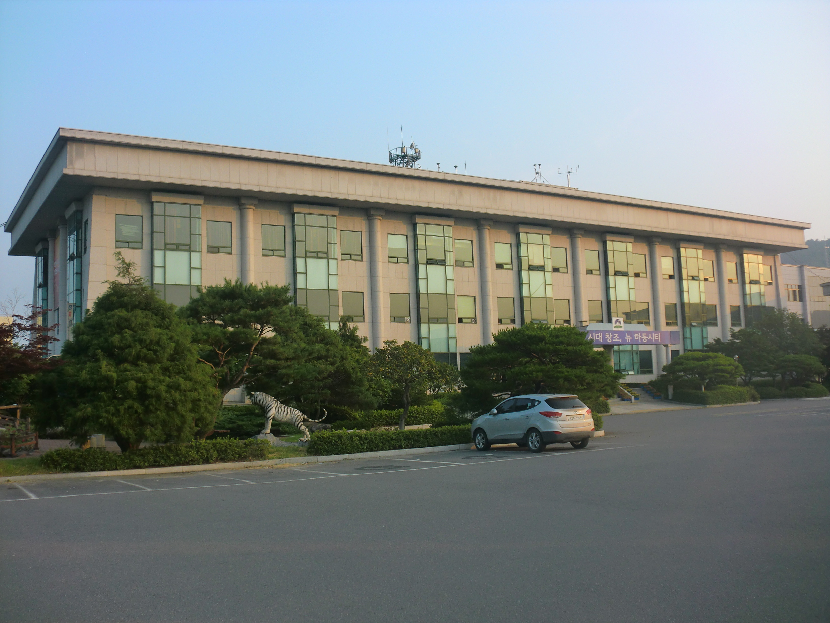 경상남도 하동군에 있는 하동군청